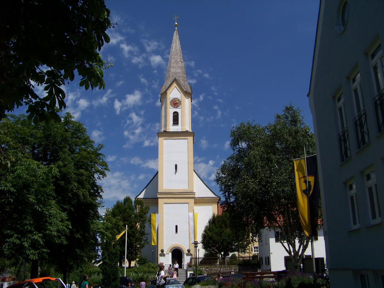 Pfarrkirche Mariä Verkündigung in Mengkofen. Der barocke Kirchenbau wurde 1722 eingeweiht.